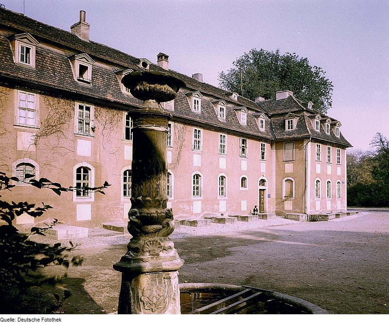 Original image description from the Deutsche Fotothek Weimar. Brunnen vor dem Haus der Frau von Stein